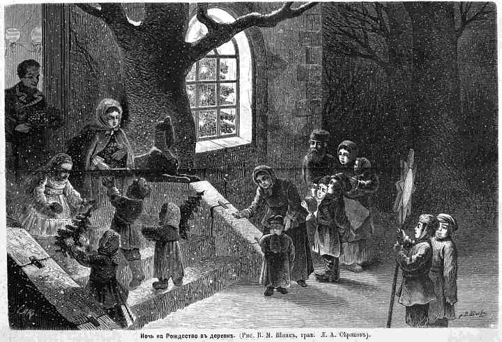 Ночь на Рождество в деревне. "Всемирная иллюстрация", №52, 1872.